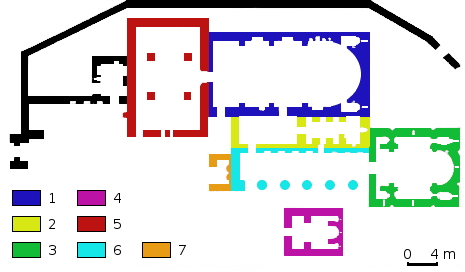 Расположение религиозных объектов монастыря Дадиванк Легенда Старинная церковь монастыря Вторая церковь (в книге Ш. Мкртчяна название не упоминается) Соборная церковь Арзу-Хатун Церковь Хасана Великого Притвор-часовня епископа Григора Зала-притвор церкви Арзу-Хатун Колокольня